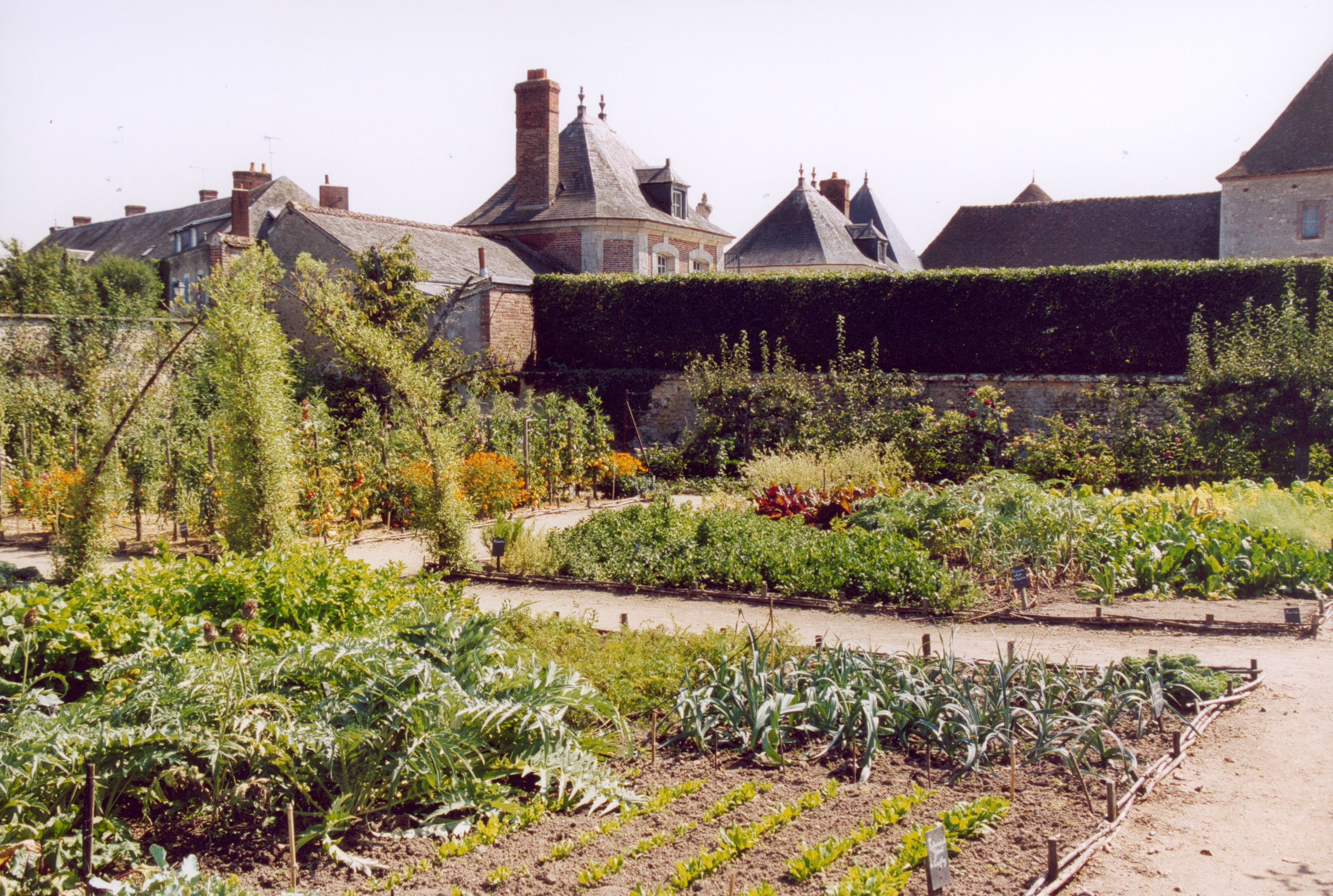 France Loiret La Bussière Le potager Photographie prise par GIRAUD Patrick